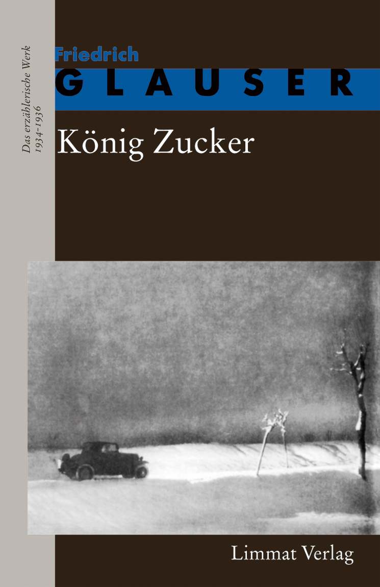 Cover von "König Zucker - Erzählungen 3" (Werkausgabe des Limmat Verlages)